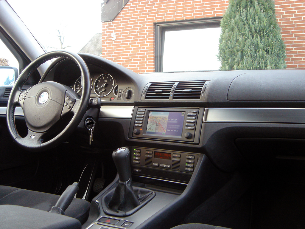 BMW E39 interieur EuroSpec